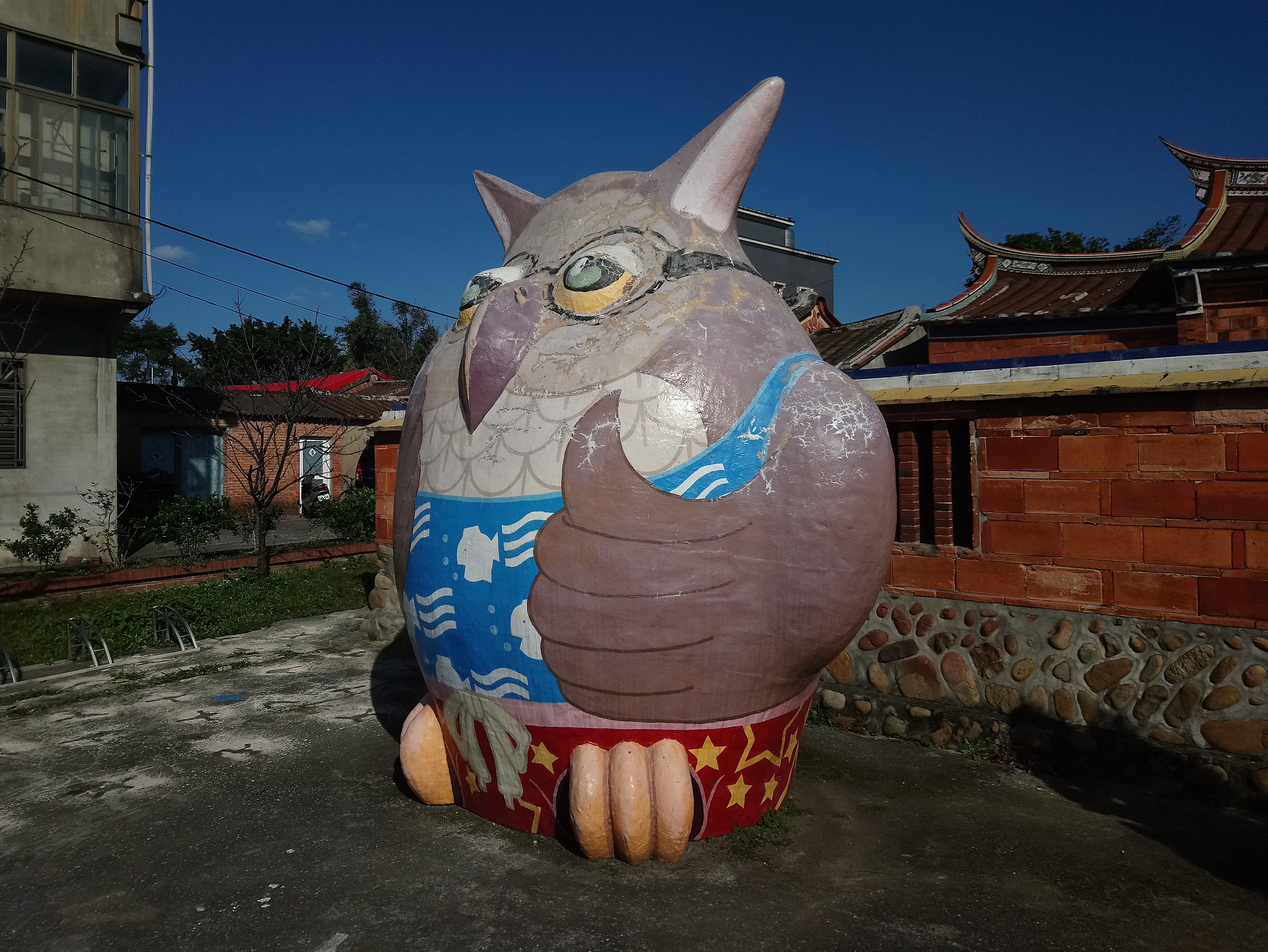 蘆竹德馨堂旁的貓頭鷹塑像,桃園市蘆竹區南崁地區山鼻里